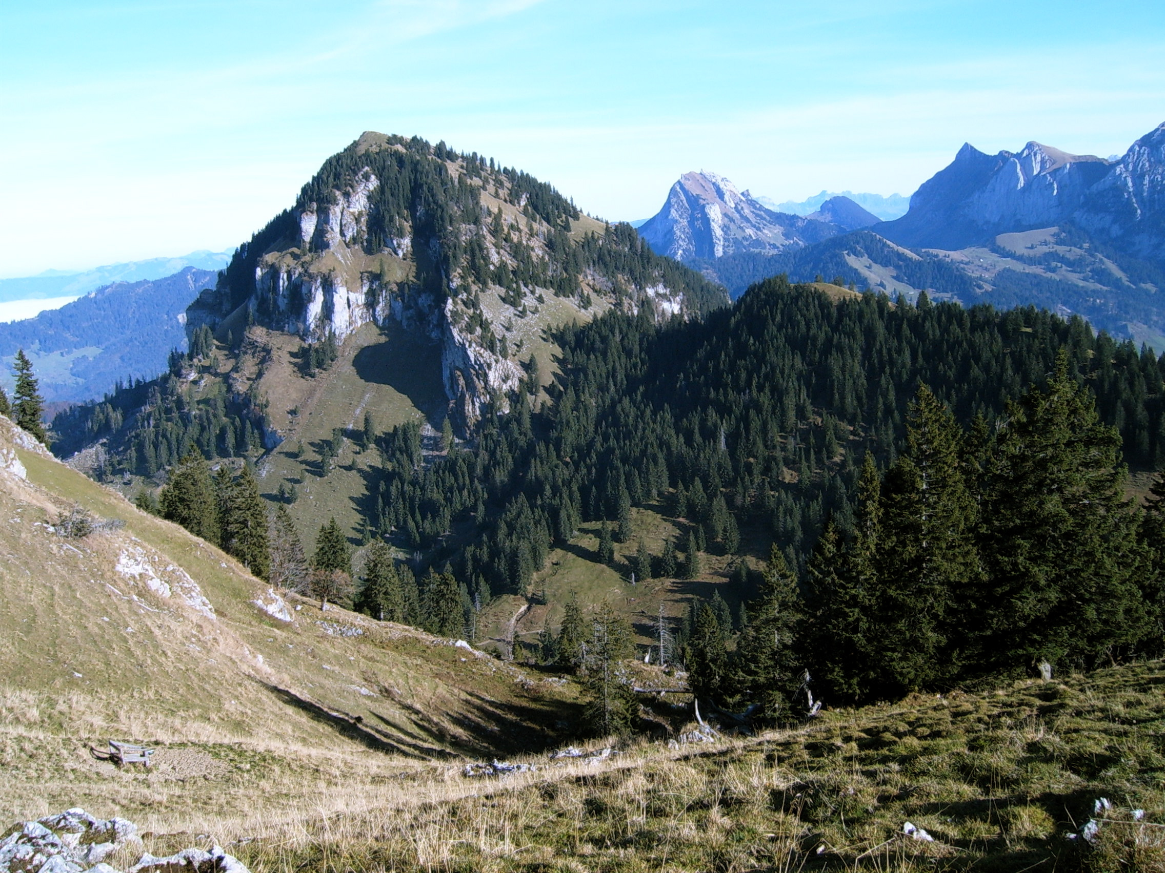 Gross Aubrig, Canton of Schwyz (Switzerland)